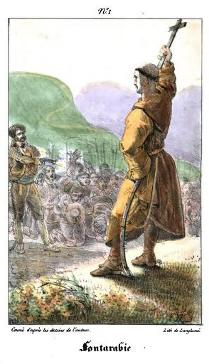 "Fontarabie" (Antonio Marañón, el Trapense). Litografía Langlumé según los dibujos del autor (Champagny) del Album d'un soldat pendant la campagne d'Espagne de 1823, París, 1829